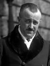 Title: Hermann Pünder People in the image: Pünder, Hermann Dr. jur.: MdB, MdL, CDU, Staatssekretär, Prozeß 20. Juli 1944, Deutschland (PND 118742884) Factual corrections and alternative descriptions are encouraged separately from the original description. Additionally errors can be reported at this page to inform the Bundesarchiv. Original historic description: Staatssekretär Dr. Pünder, wurde zum Regierungspräsidenten in Münster ernannt ! Staatssekretär Dr. Pünder, welcher nach Münster als Regierungspräsident geht, war ein Mitarbeiter des ehemaligen Reichskanzlers Dr. Brüning in der Reichskanzlei.